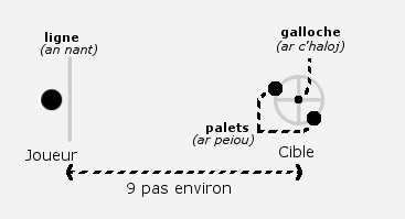 Schéma du jeu de la galoche (schéma personnel).